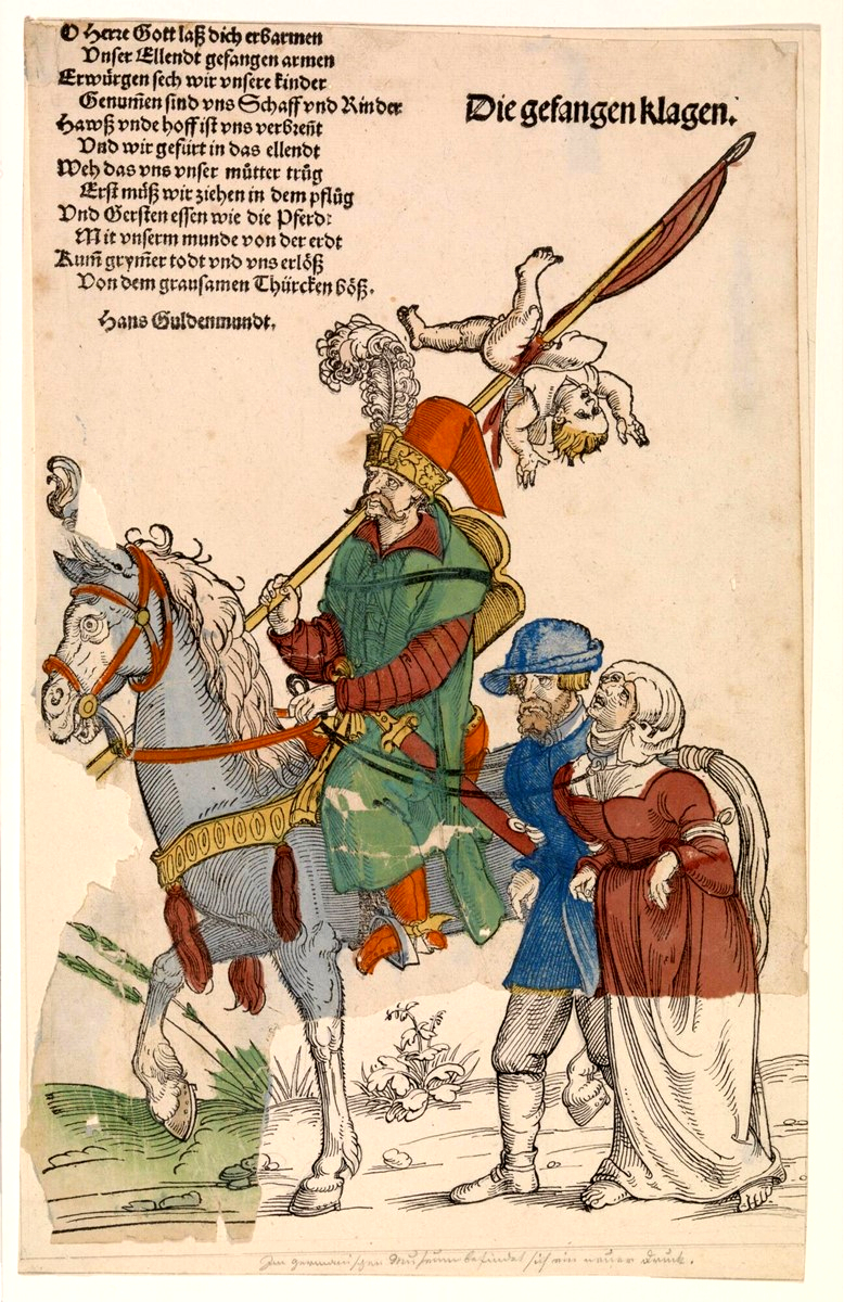 Die gefangen klagen. Türkischer Krieger verschleppt Gefangene in die Sklaverei. 303 x 197 mm. woodcut, watercolour and letter press